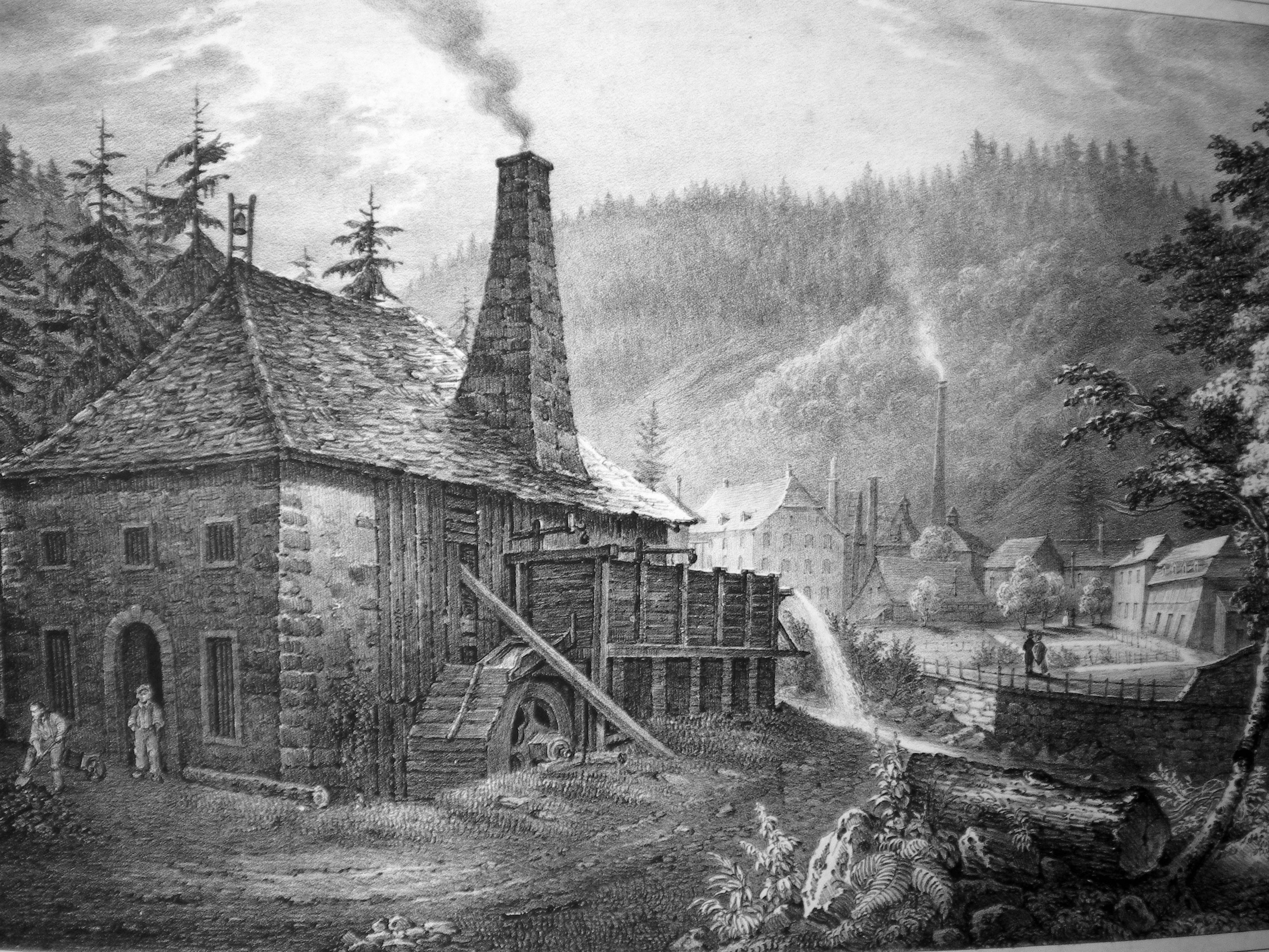 forges de Framont, litho